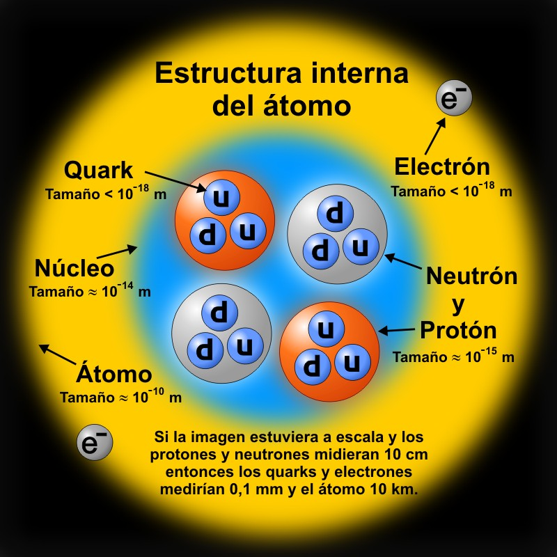 Esquema de la estructura interna del átomo a nivel de los quarks